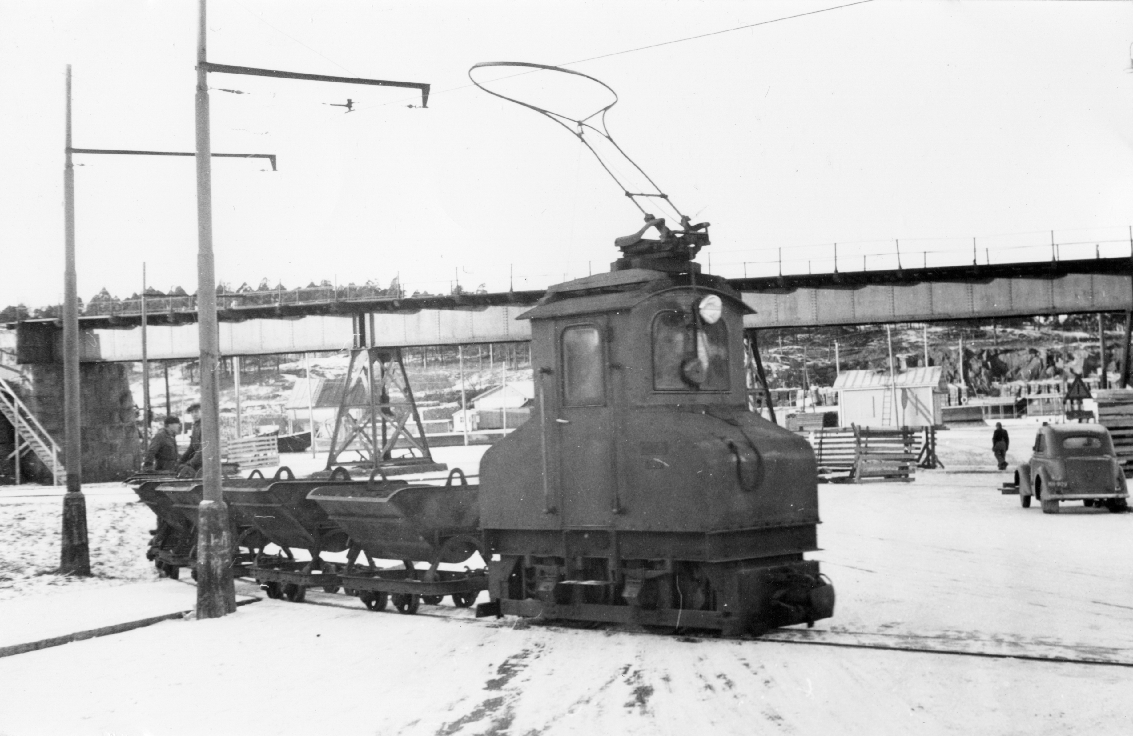 Photo Vapriikki Photo Archives.